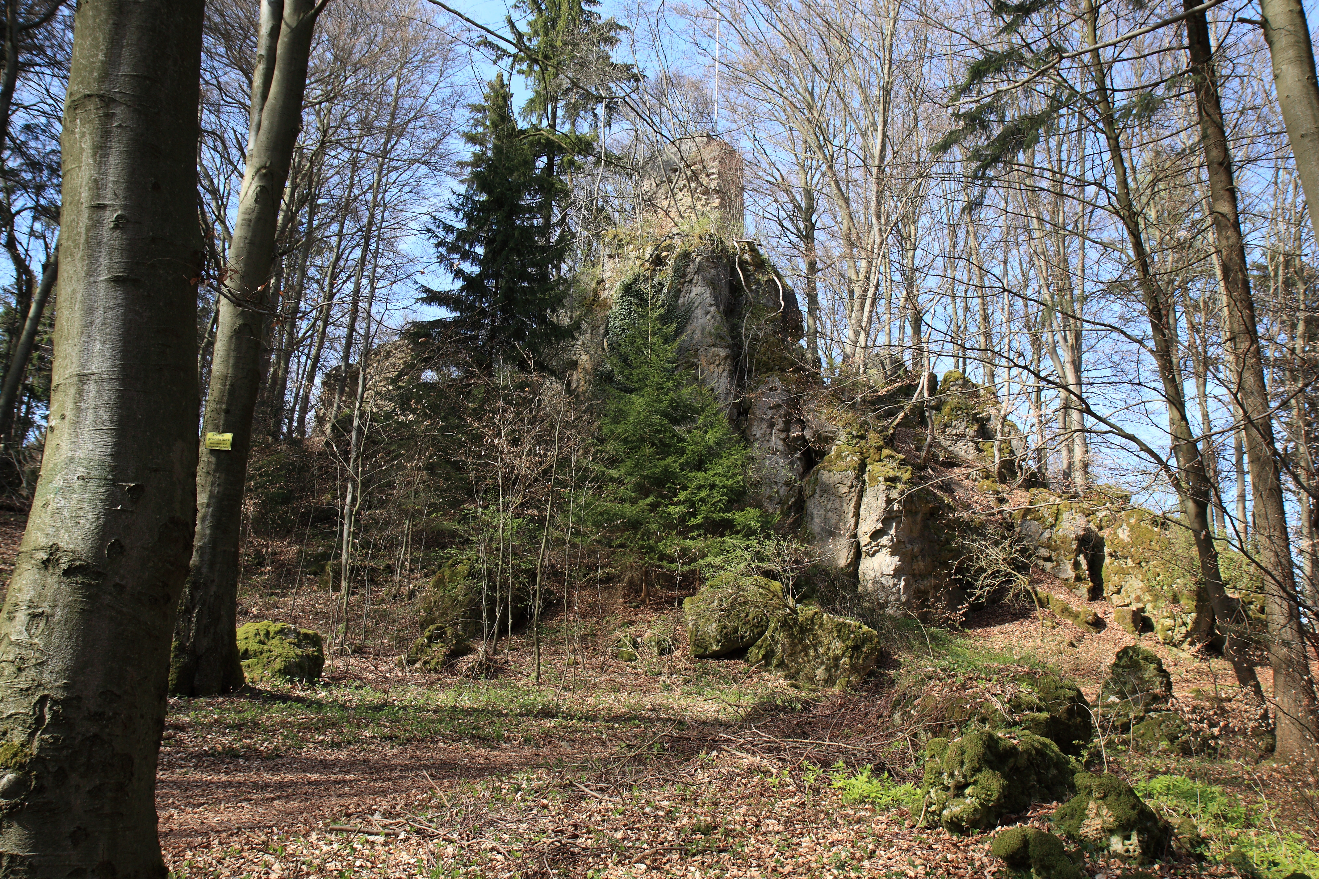 Ansicht des Turmes der Burgruine Poppberg